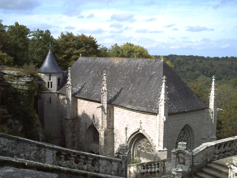 Vue générale